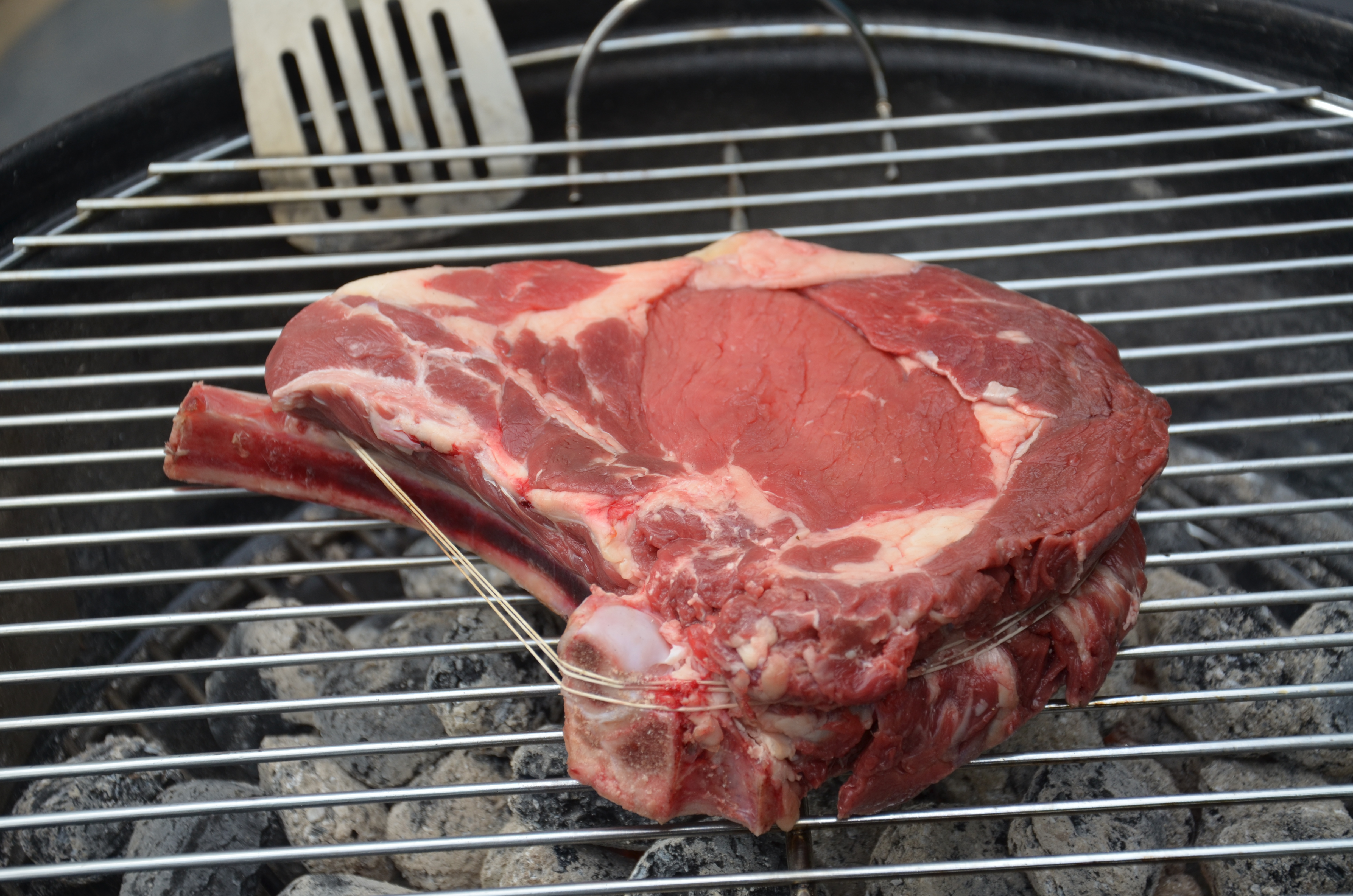 Une côte de boeuf crue posée sur une grille de barbecue.